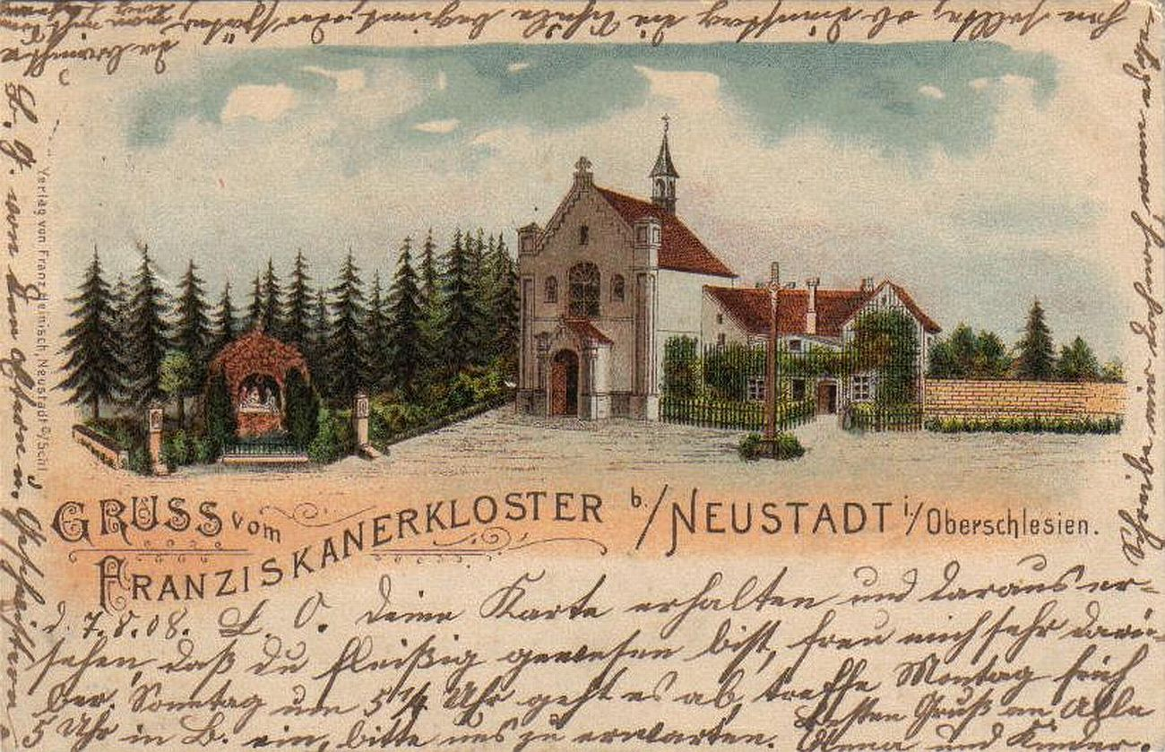 Klasztor franciszkanów w Prudniku-Lesie 1900-1905